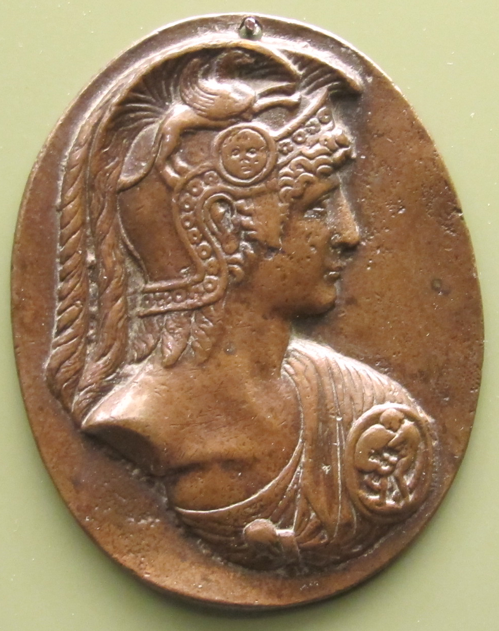 Scipione africano, dataz incerta